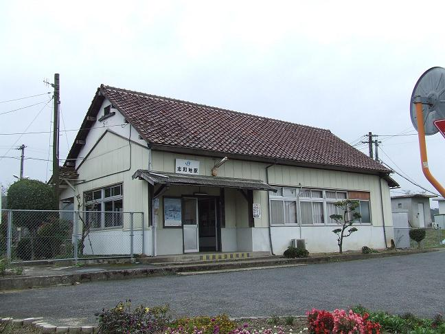 JR西日本芸備線志和地駅の駅舎